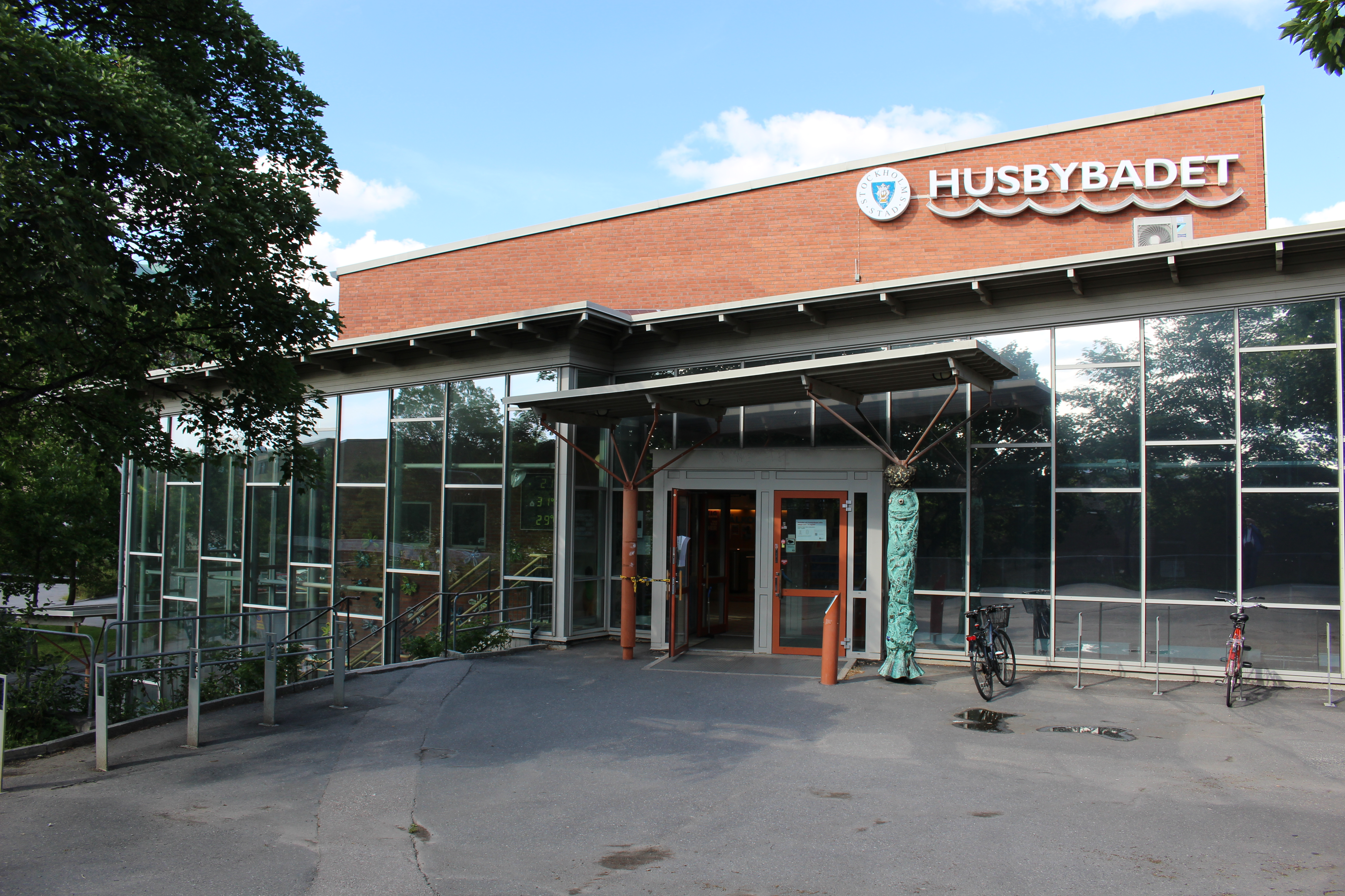 Husbybadet